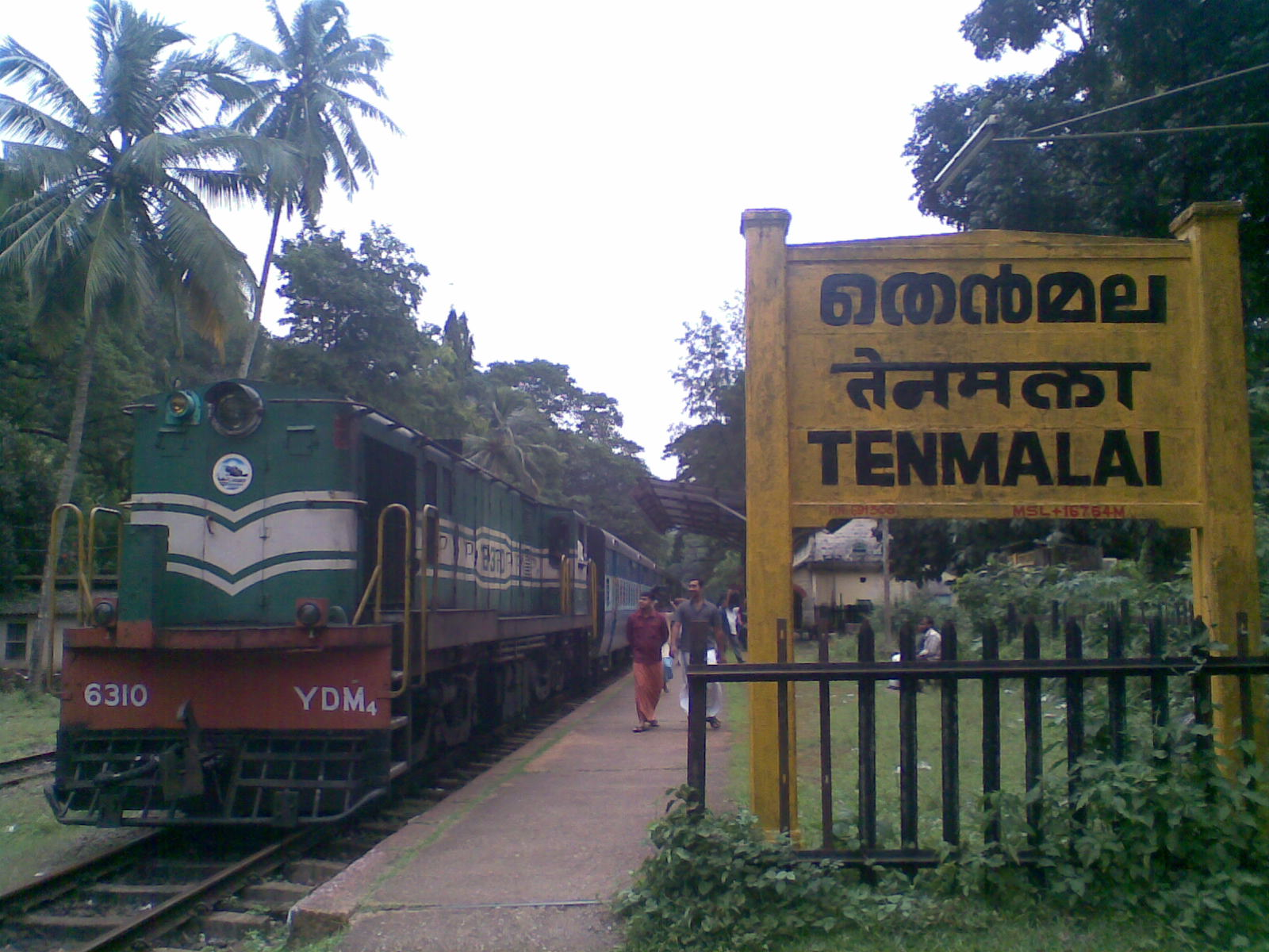 തെന്മല റെയിൽവേസ്റ്റേഷനിലേക്ക് മീറ്റർഗേജ് തീവണ്ടി എത്തുന്നു